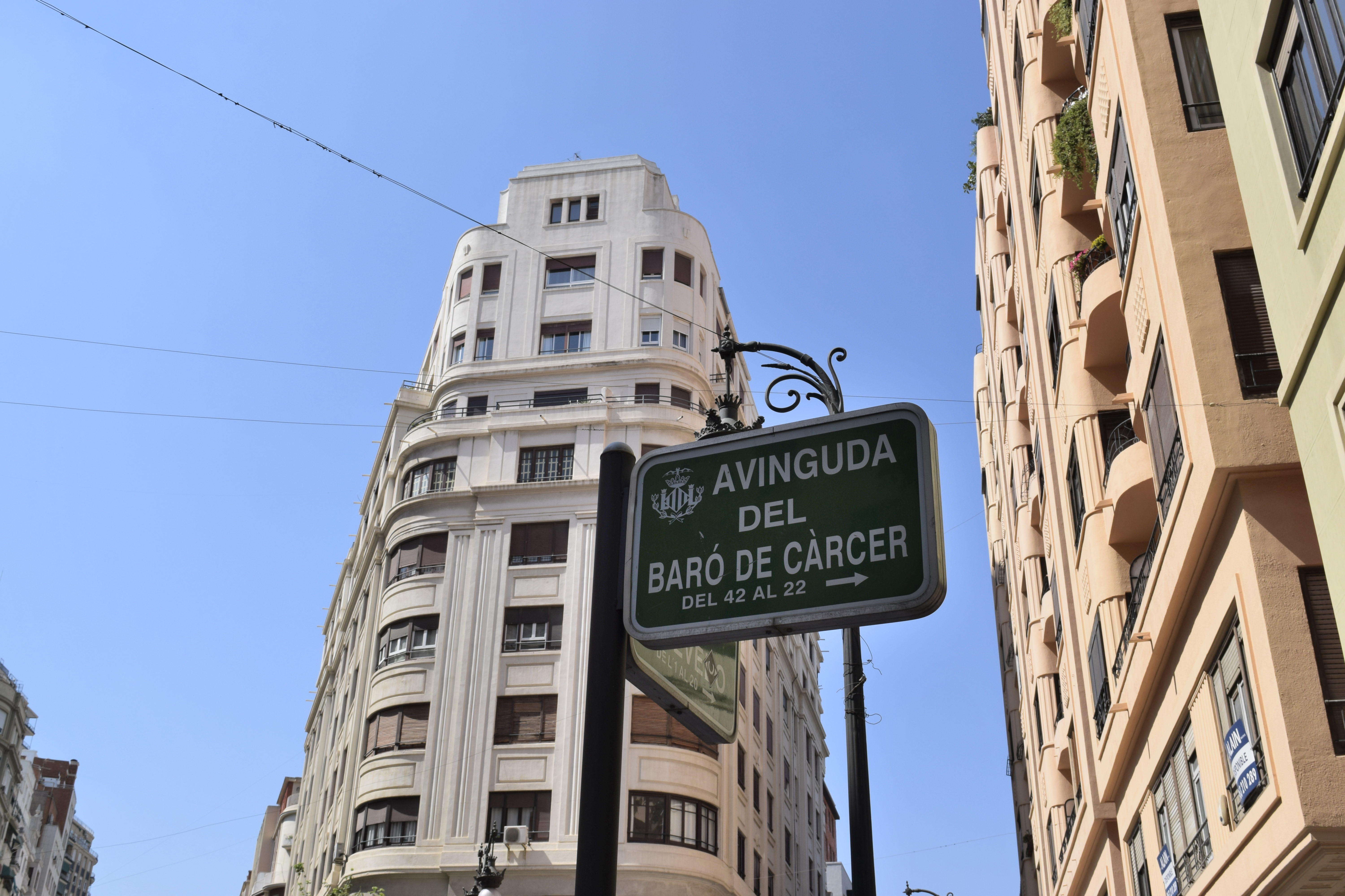 Avenida Barón de Cárcer, cruce con Calle Quevedo